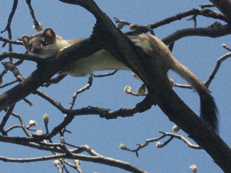 Mustela erminea, Zámčisko, Slovakia